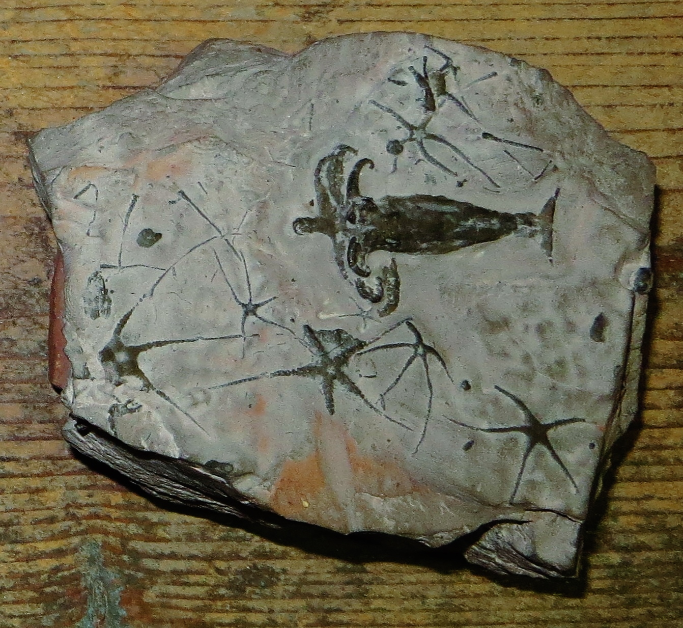 Fossil of Rhomboteuthis and Ophiopinna- Took the picture at Museo di Storia Naturale di Milano